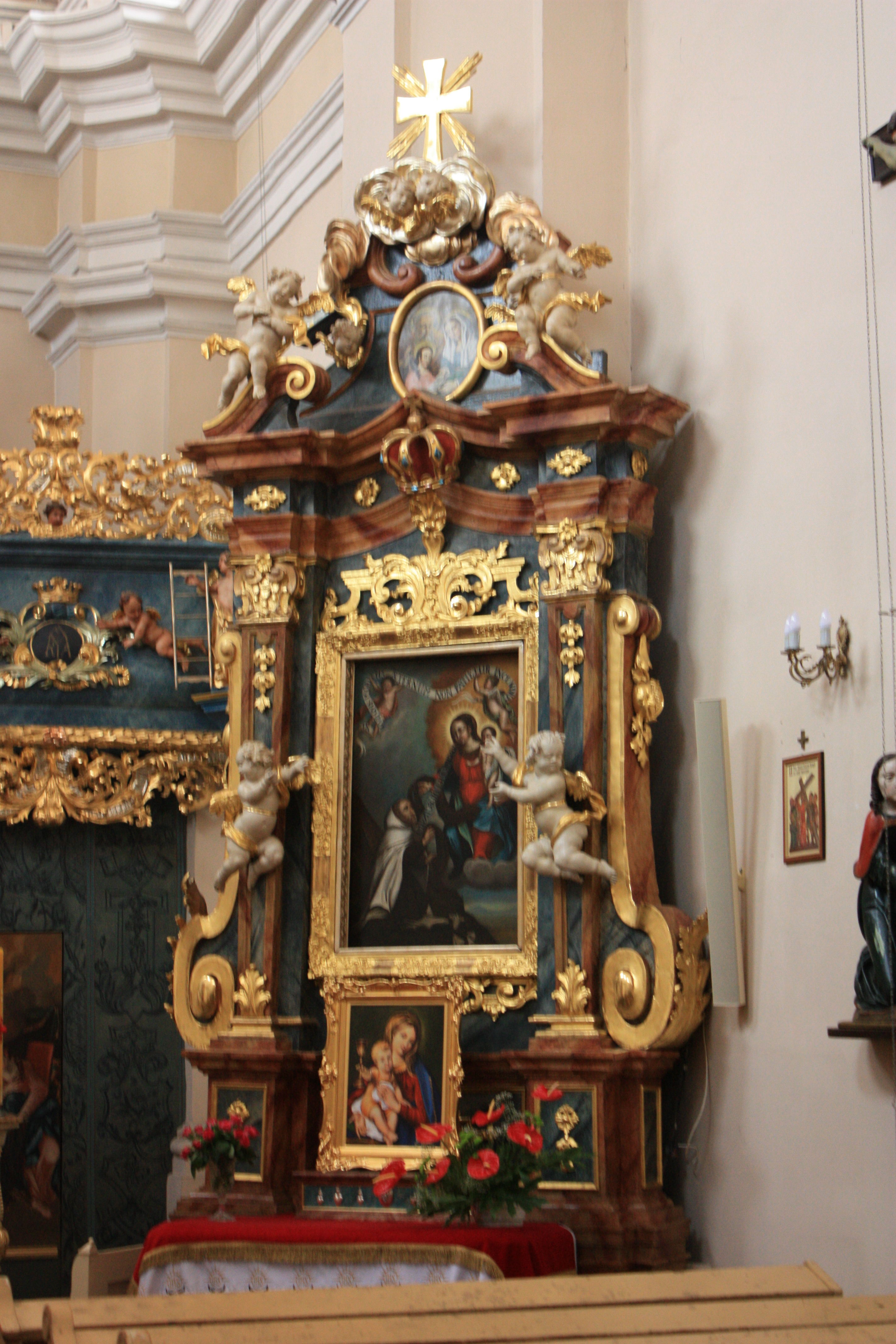 Kościół Najświętszej Krwi Pana Jezusa w Poznaniu. Prawy ołtarz boczny.